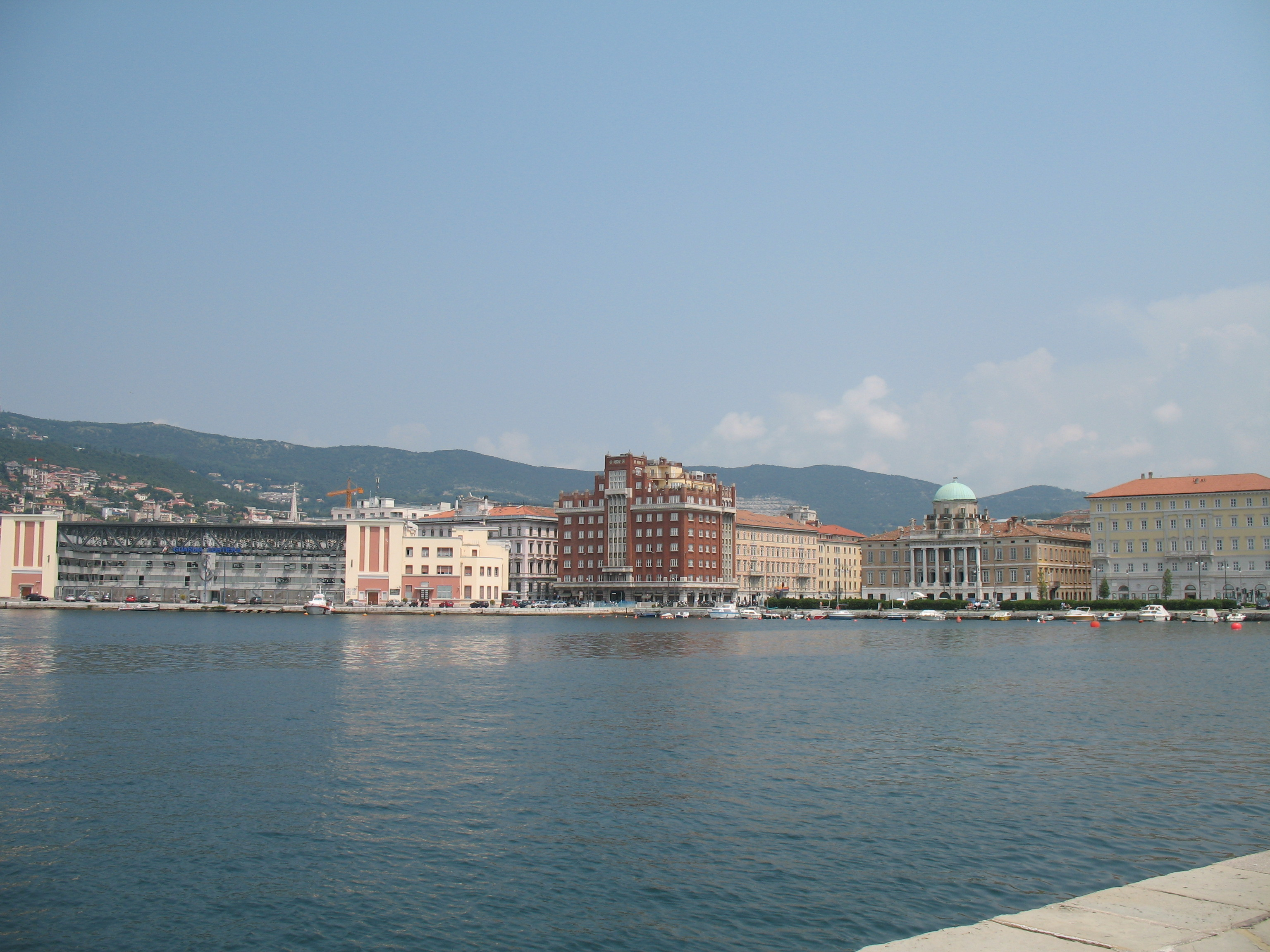 Immagine da Trieste, Friuli-Venezia Giulia, Italia.